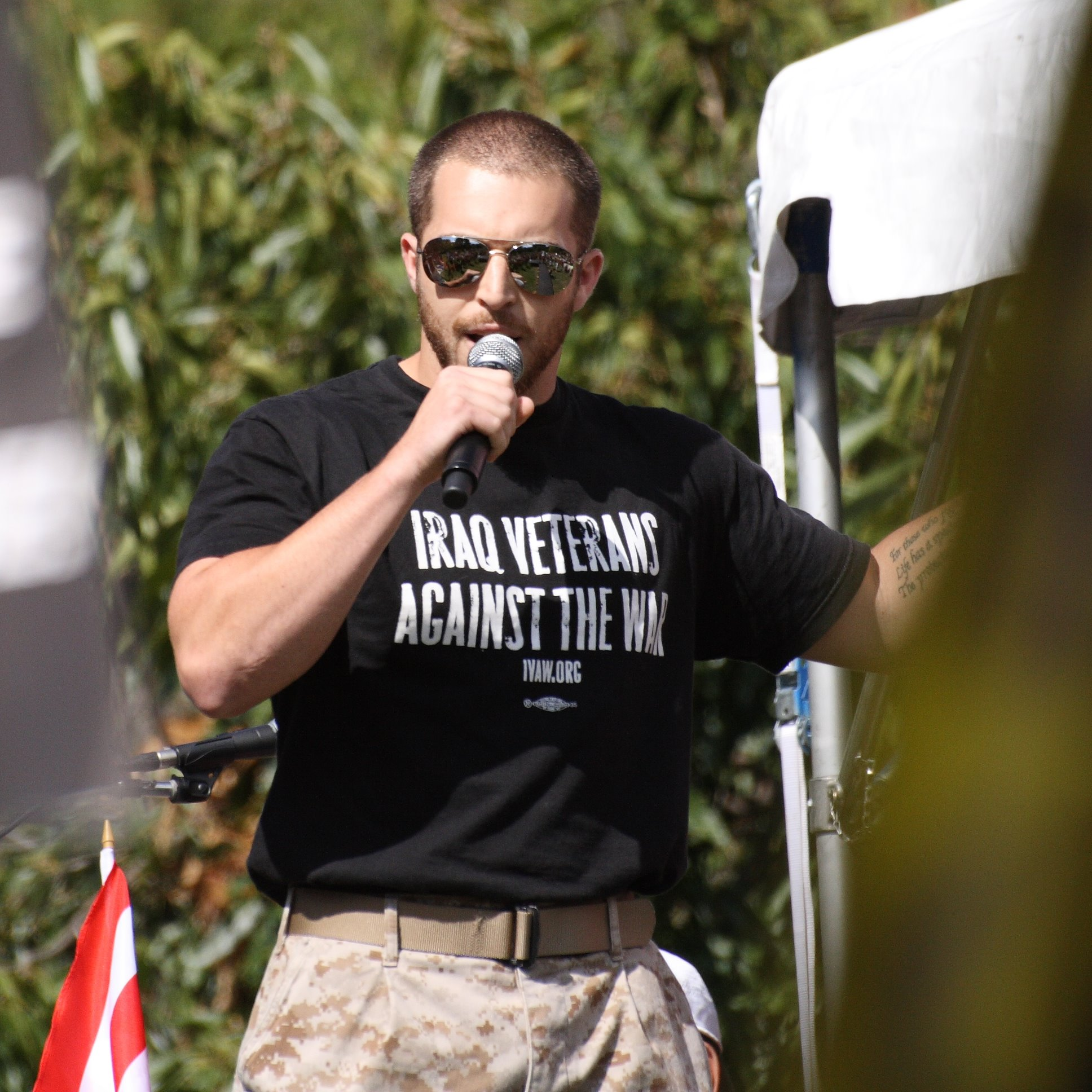 Adam Kokesh